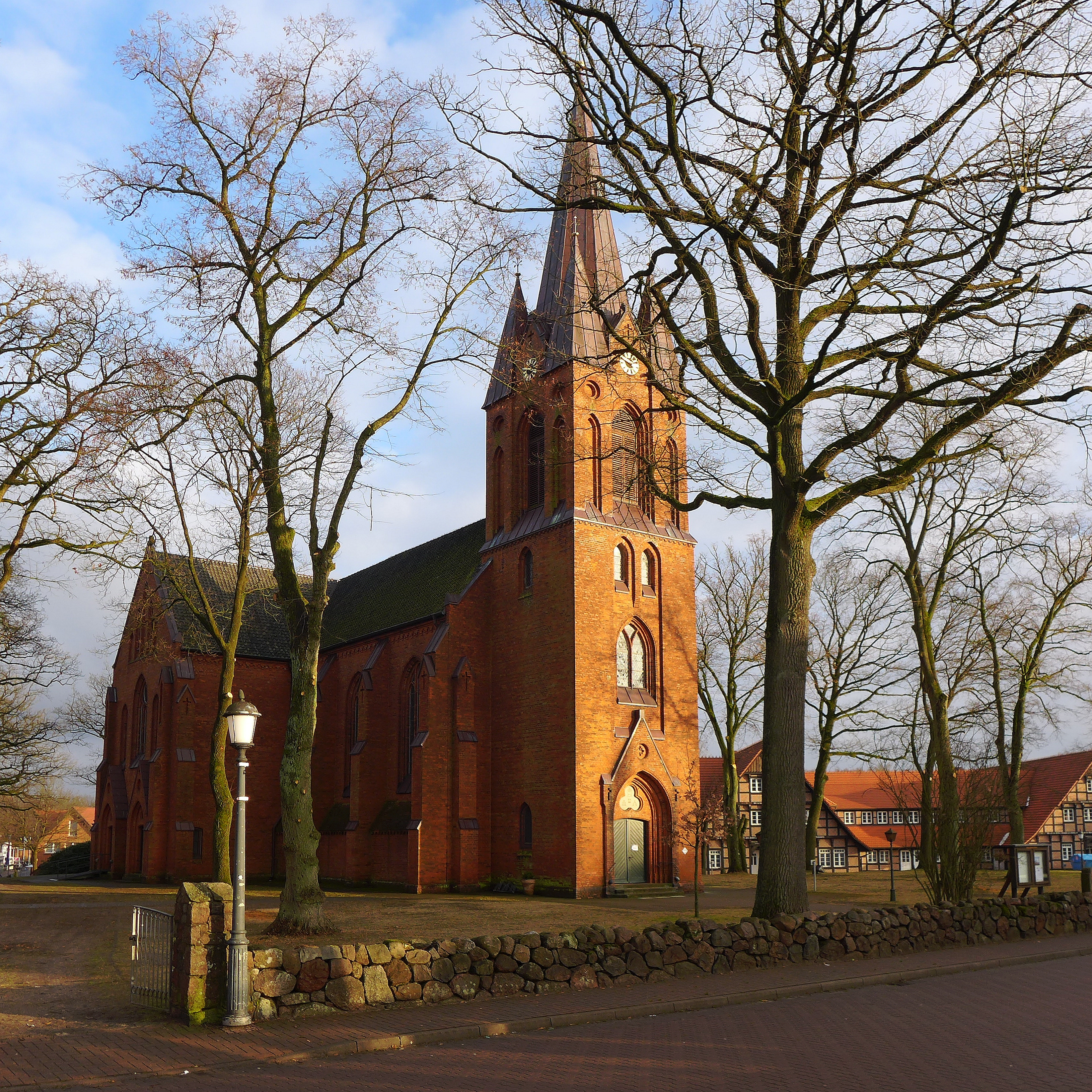 Die St. Jakobi Kirche in Hanstedt, Landkreis Harburg. Neugotische Backsteinkirche, erbaut 1881/82. Aufnahmedatum 2017-02.